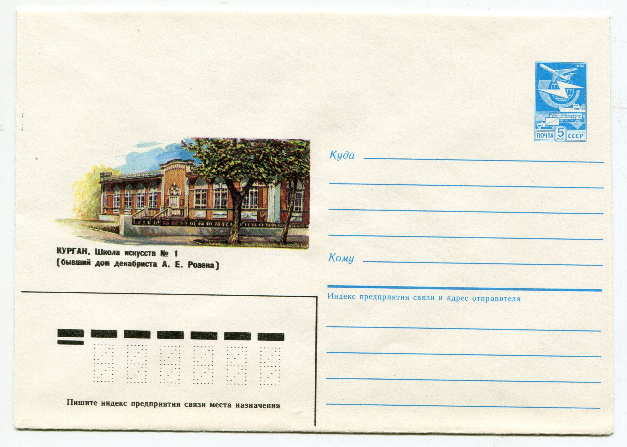 Курган, школа искусств №1 (дом Розена), почтовый конверт